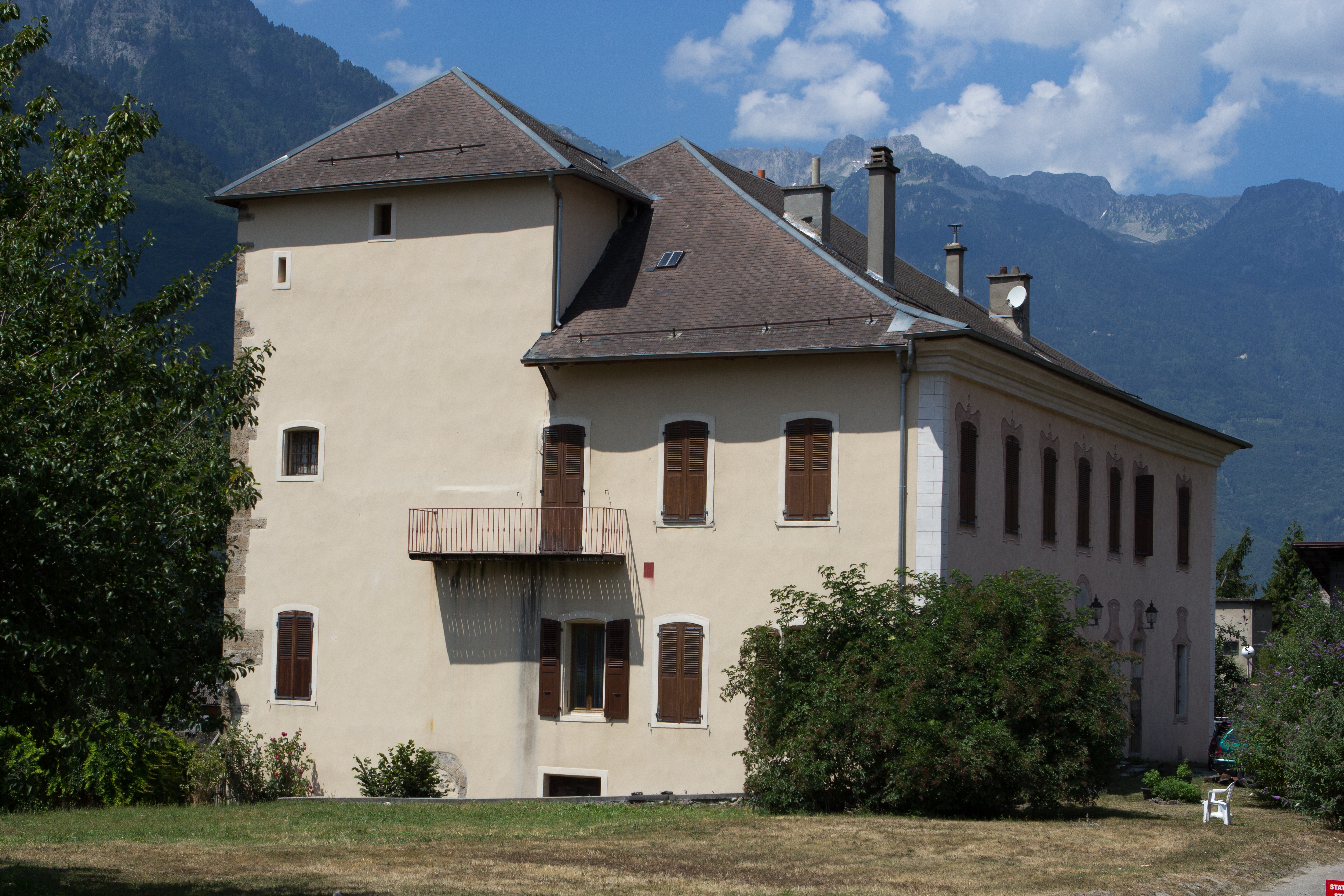 Maison de la Tour, Académie de Maurienne / La Chambre / Savoie / France